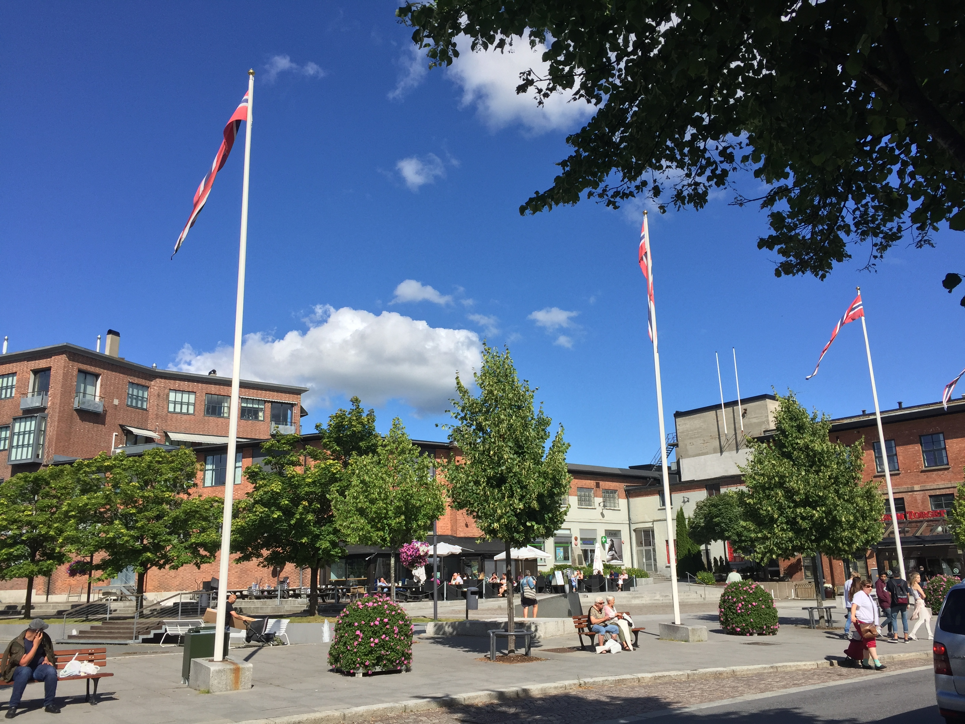 Foto: Glenn Thomas Nilsen